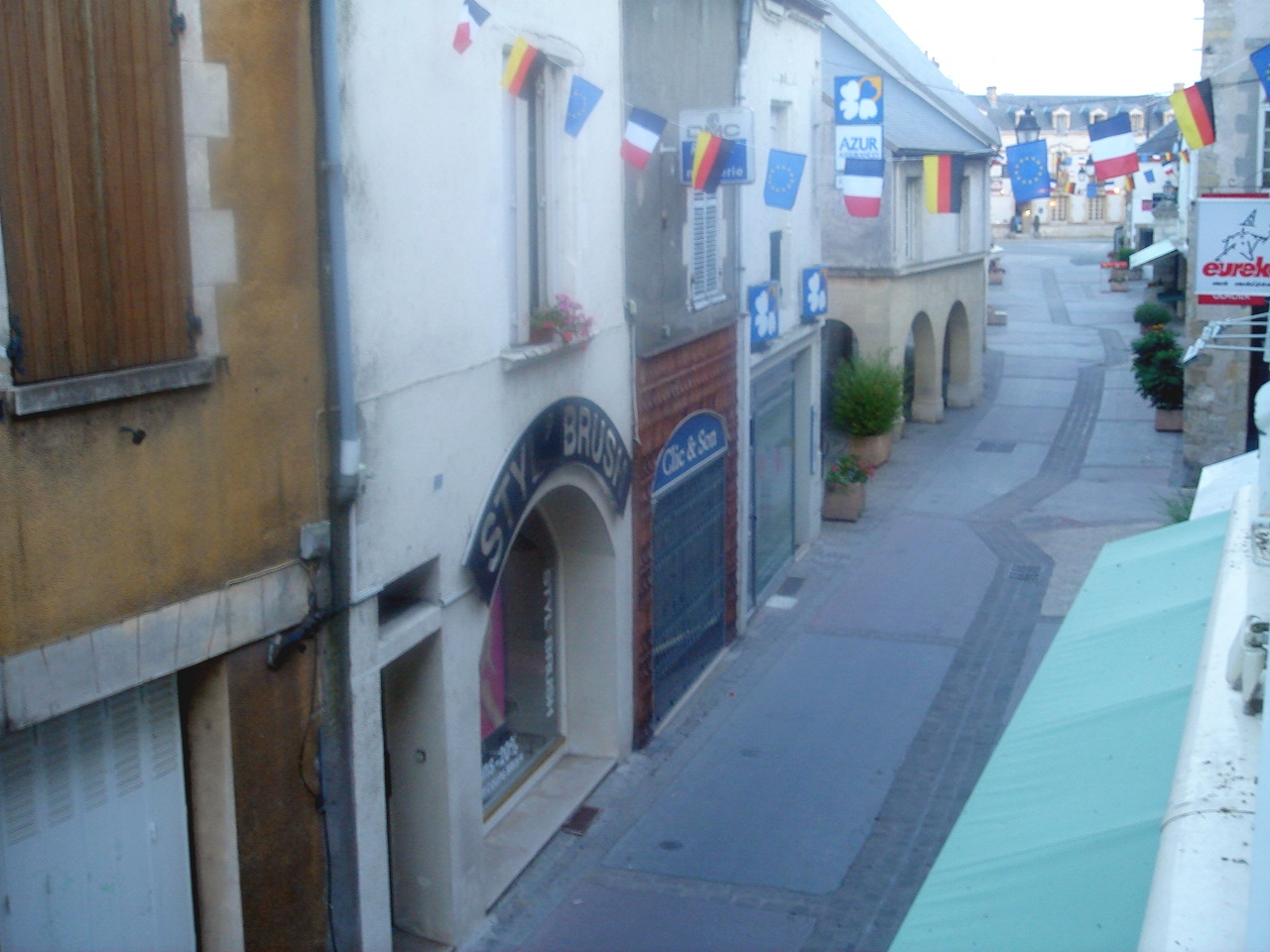 Grande-rue piétonne, Jargeau, Loiret, France